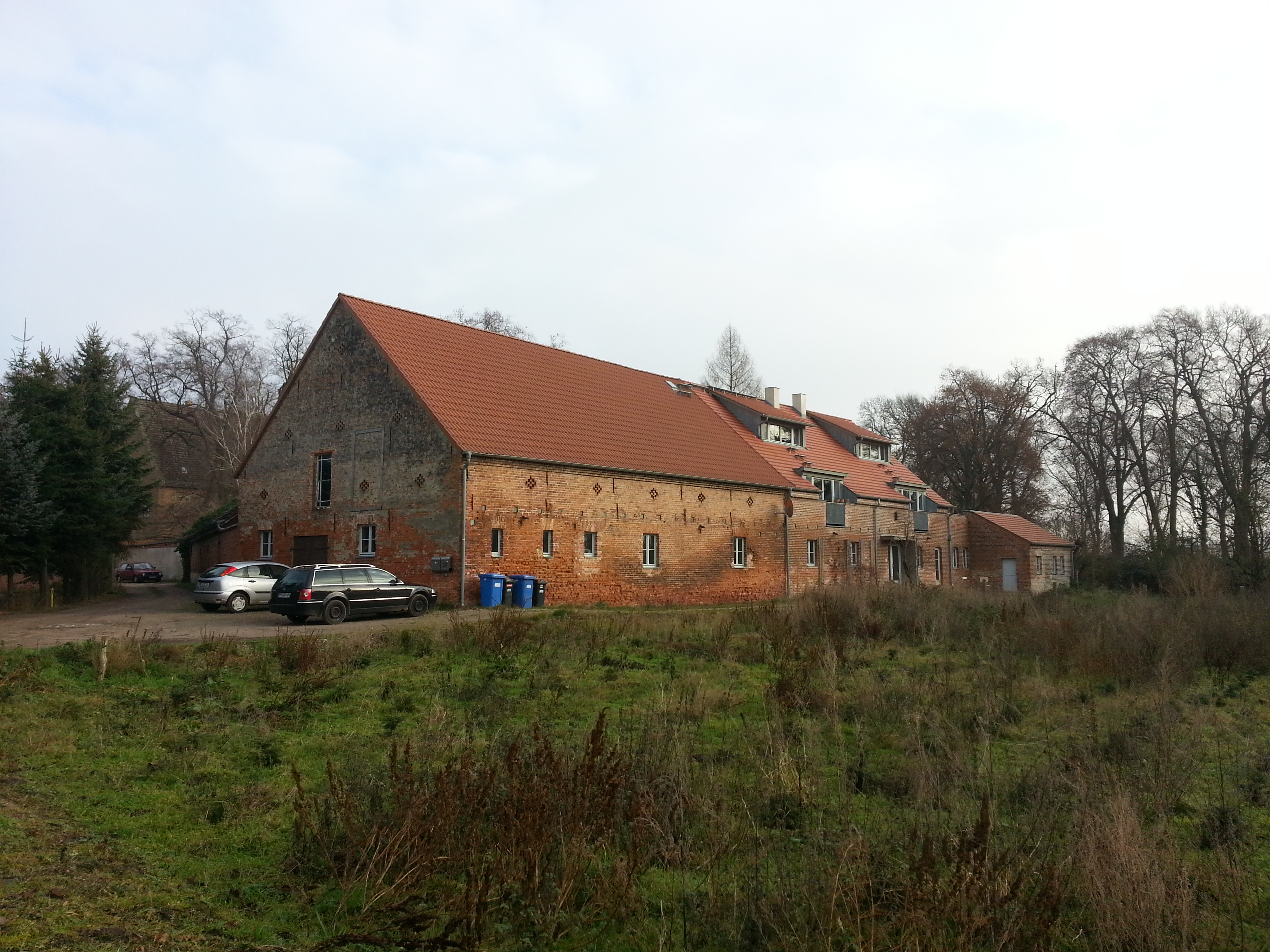 gutshaus bagow stallgebäude